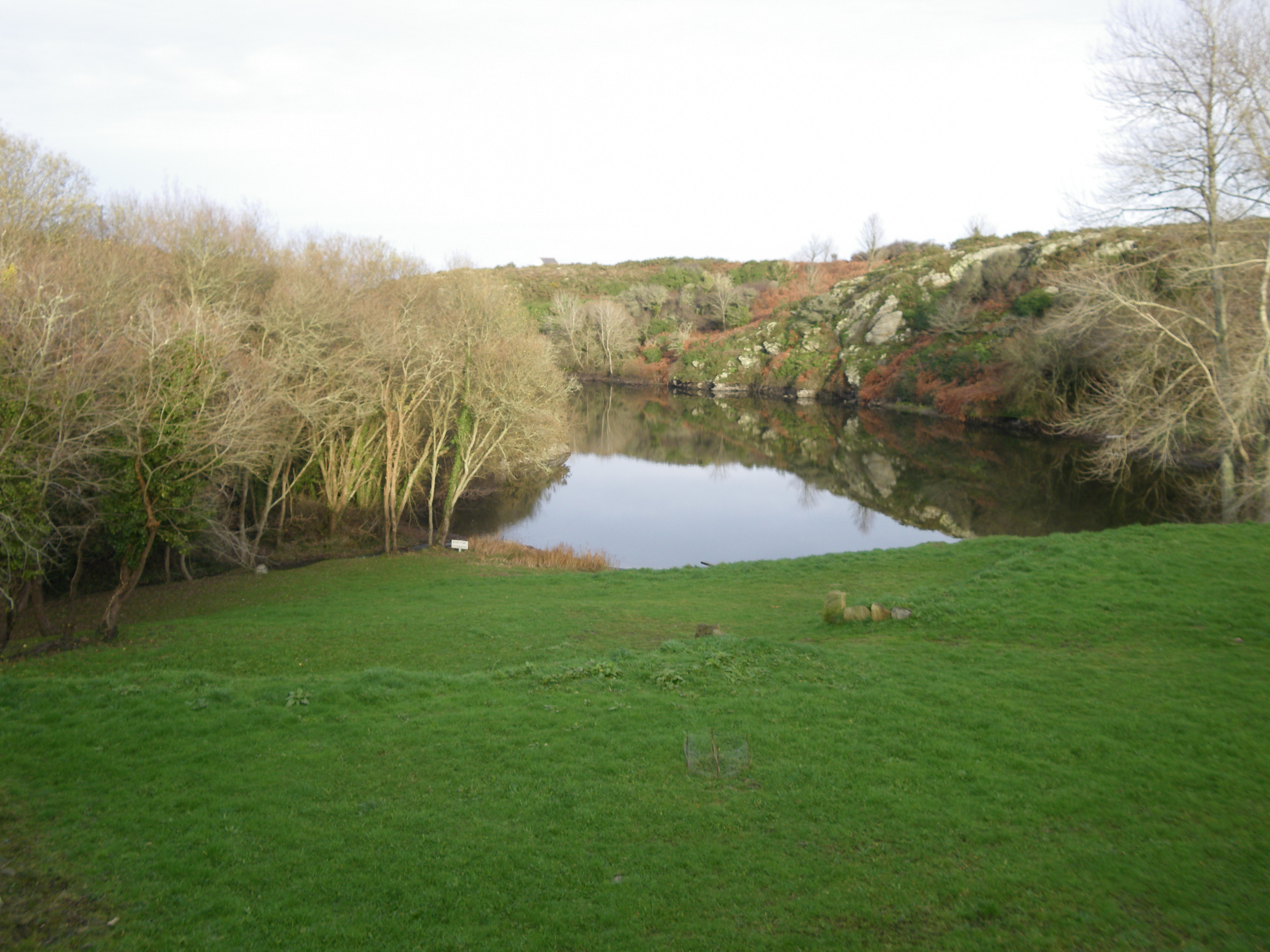 port melin